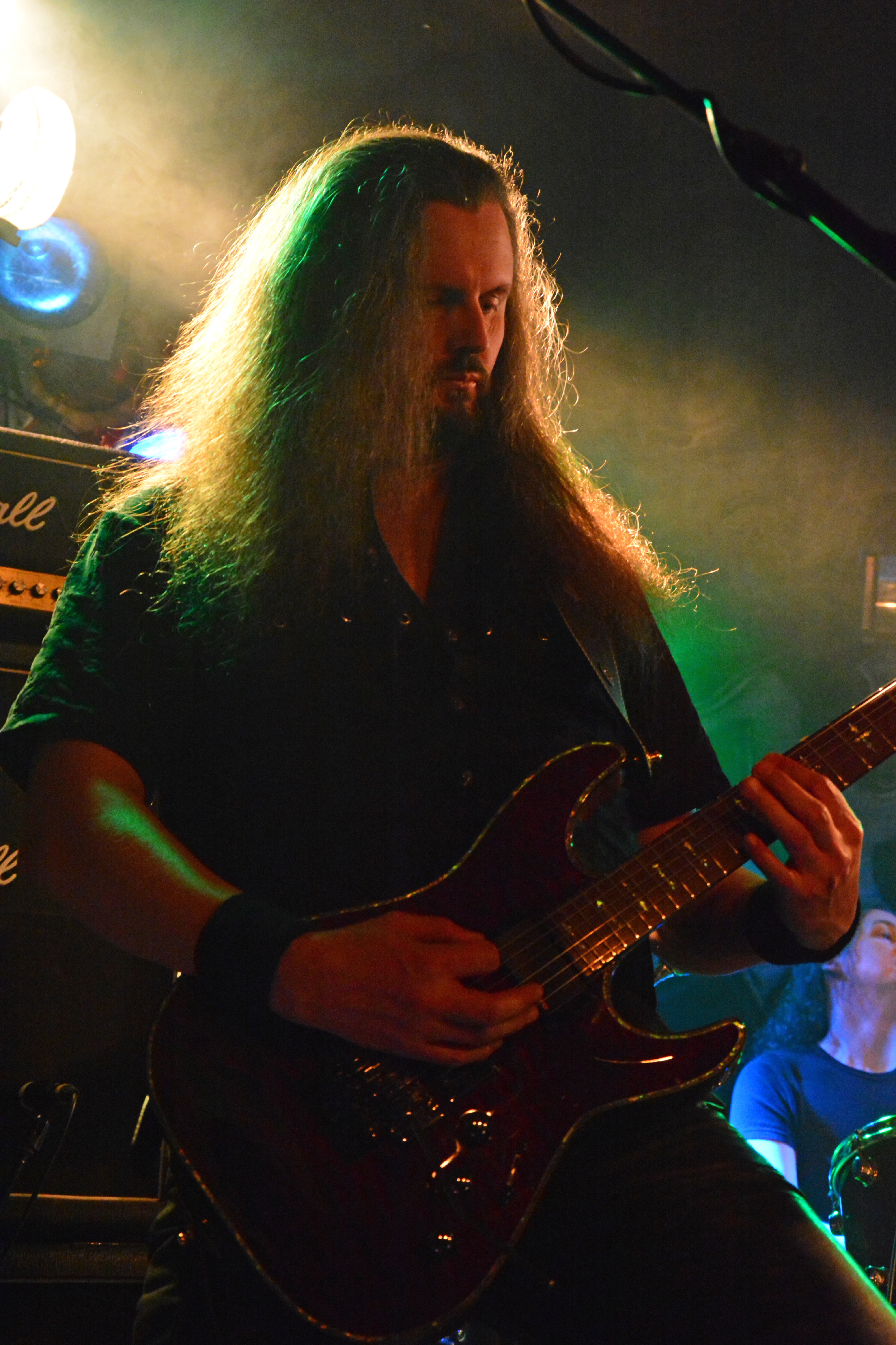 Gitarrist von Paragon bei den Hamburg Metal Dayz 2013